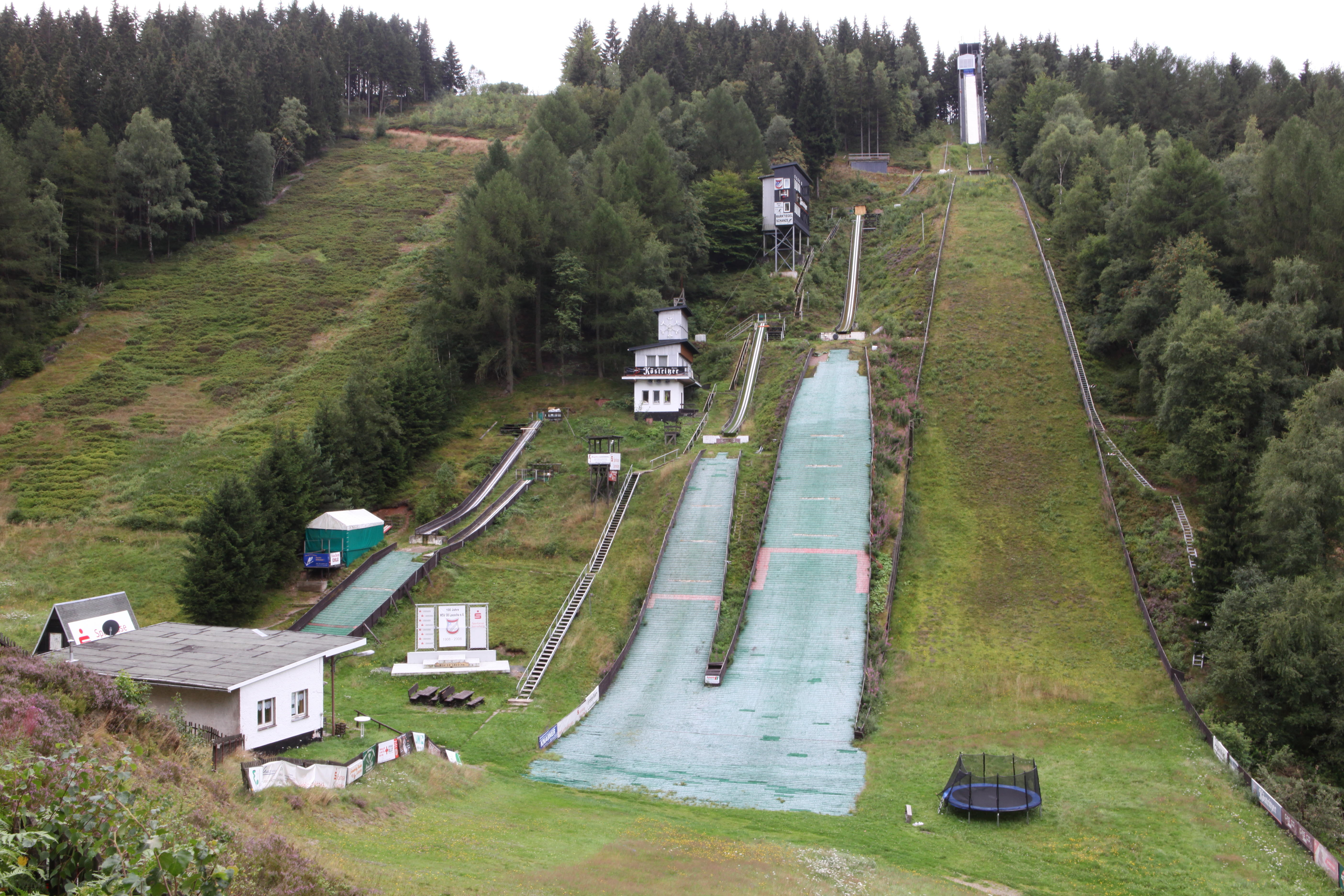 Marktiegelschanze in Lauscha